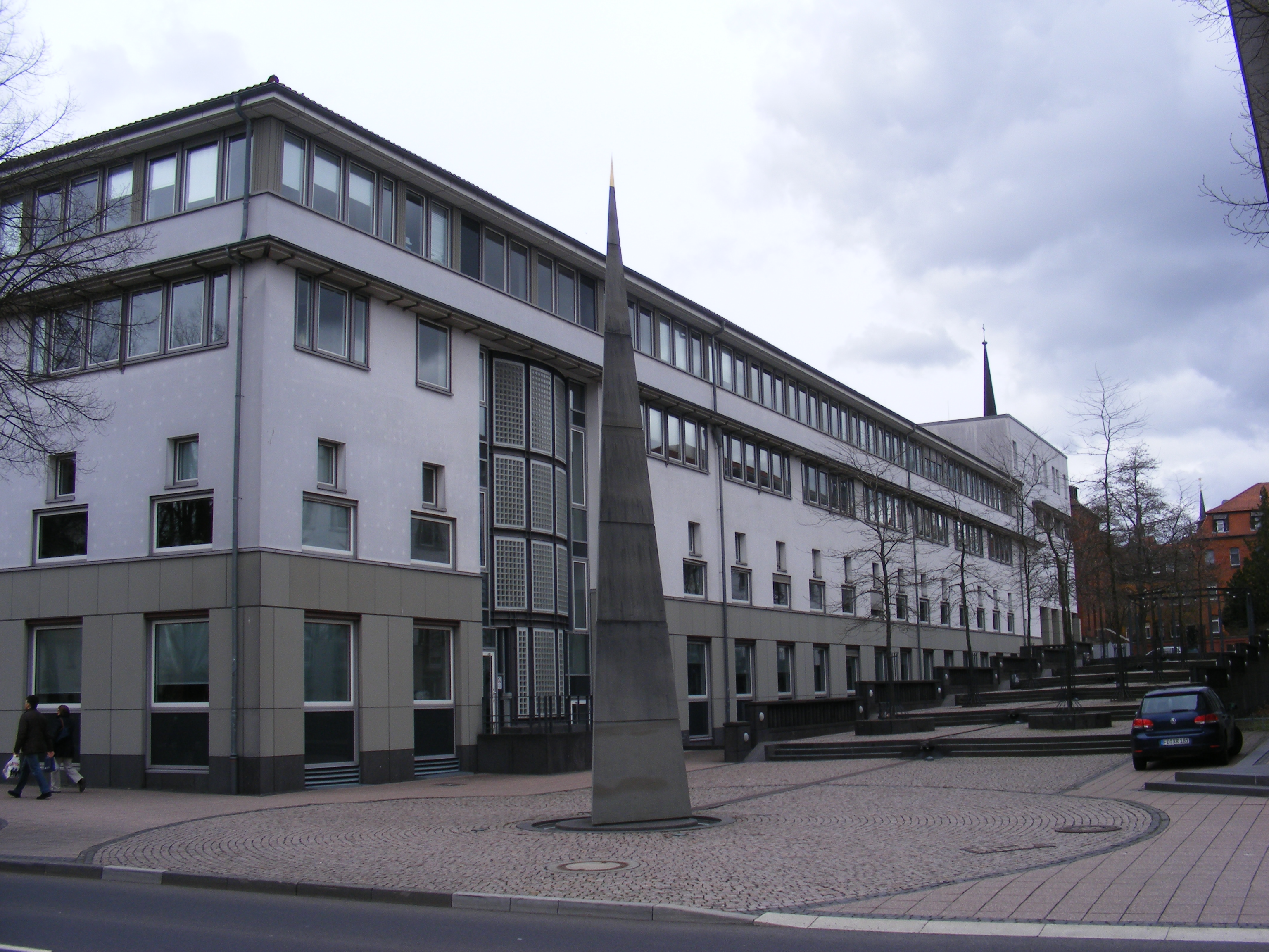 Fulda - Justizgebäude (Treppe und Skulptur).